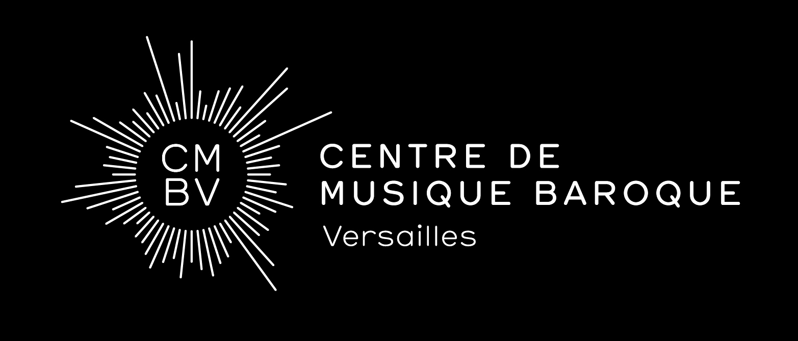 Nouveau logo 2017 du CMBV